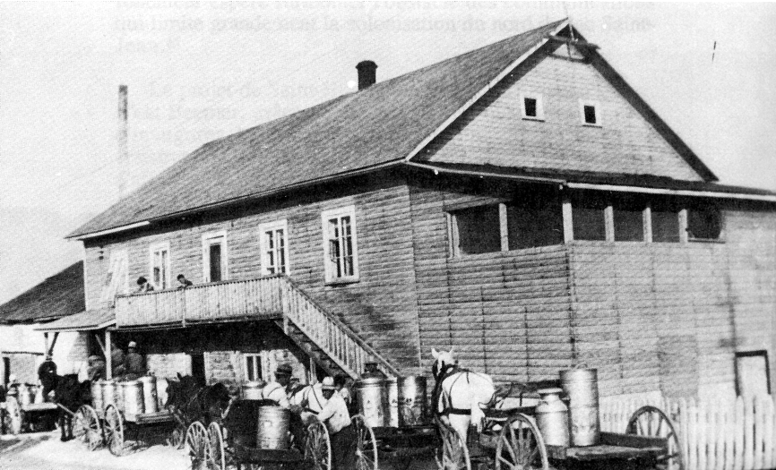 La réception du lait à la fromagerie Albert Perron, vers 1935